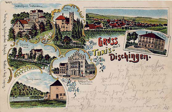 Dischingen Kreis Heidenheim AK um 1900